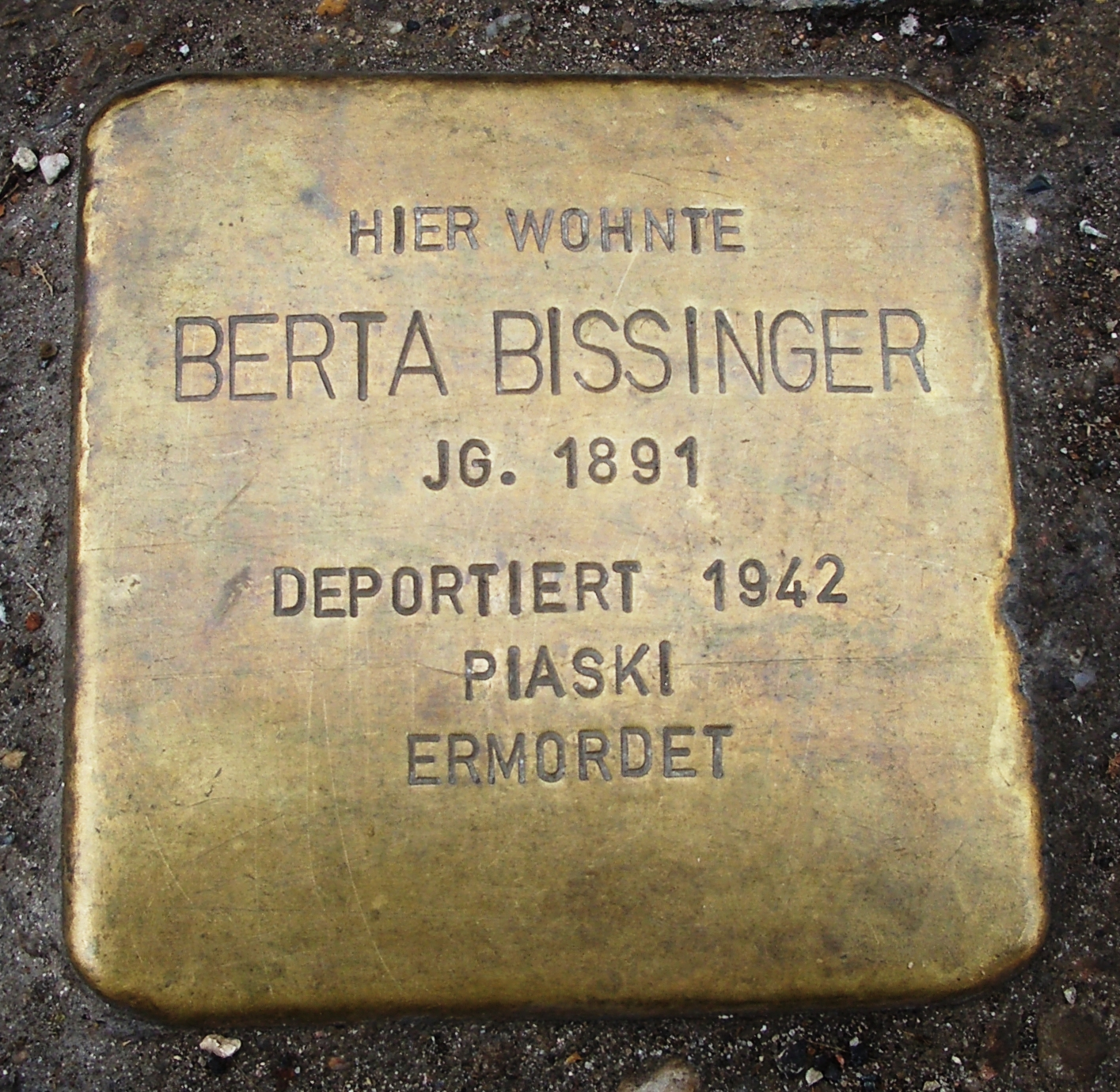 Der Stolperstein für Berta Bissinger befindet sich in der Augsburger Straße 34 in Neu-Ulm, Bayern.